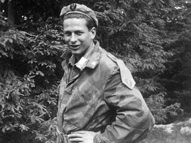 Giano Accame